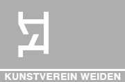 Kunstverein Weiden in der Oberpfalz